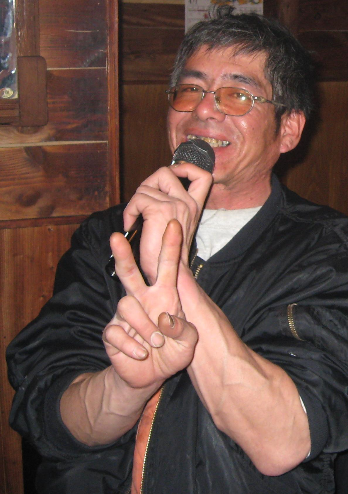 Chatama in 和風スナック からまつ（アップロードなどは被写体の承諾済み）